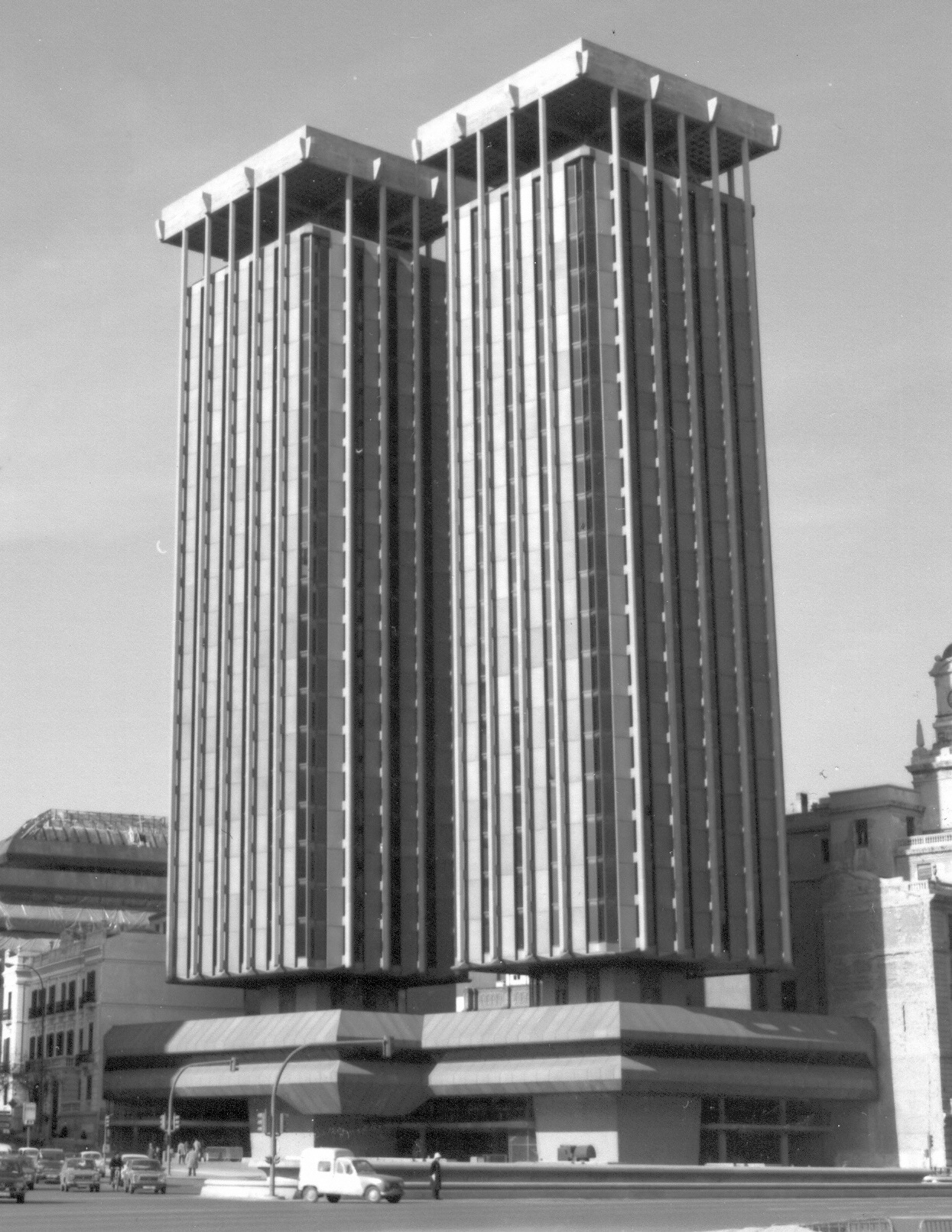 Antonio Lamela. Torres de Colón en Madrid. En su estado original previo a la modificación de los años 90.